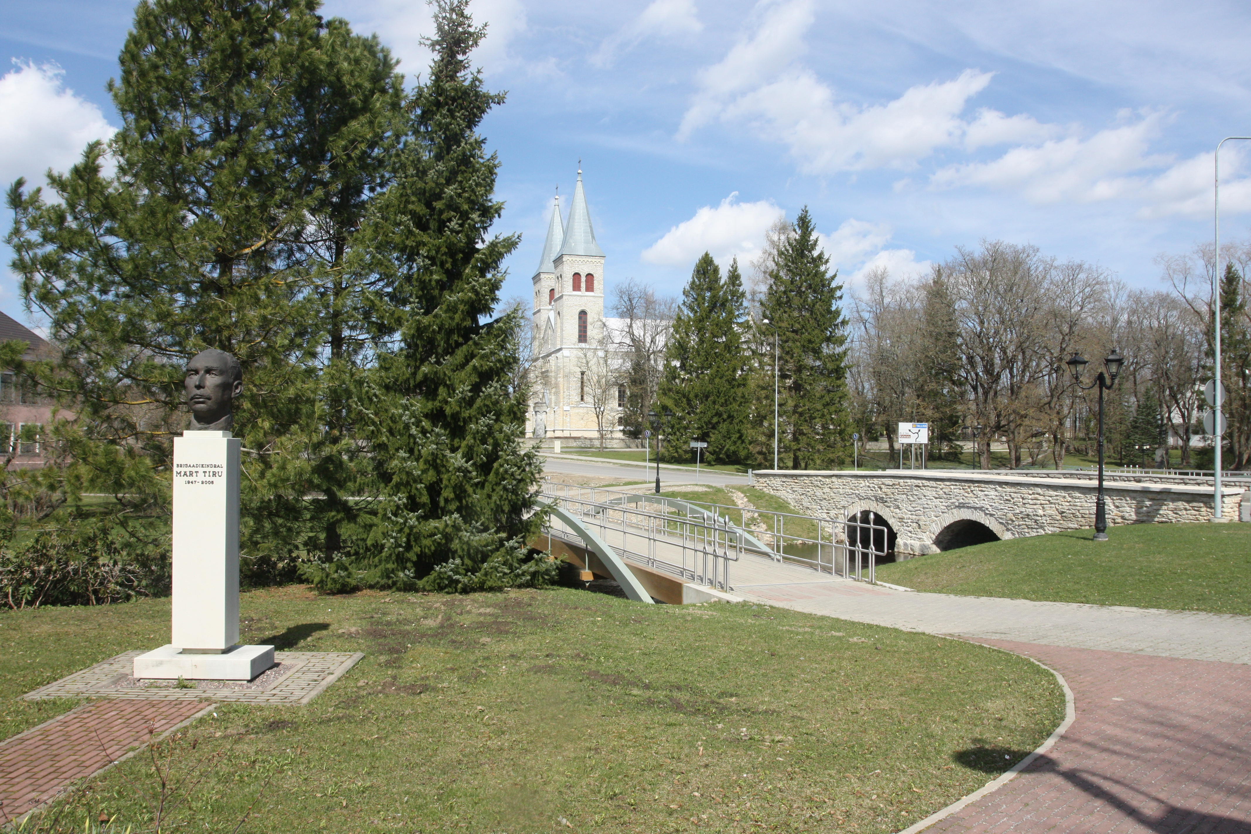 Brigaadikindral Märt Tiru portreeskulptuur Raplas . Skulptuur avati 22.06.2007. Brigaadikindral Märt Tiru (10.10.1947-18.10.2005) põrm puhkab Tallinna Metsakalmistul.